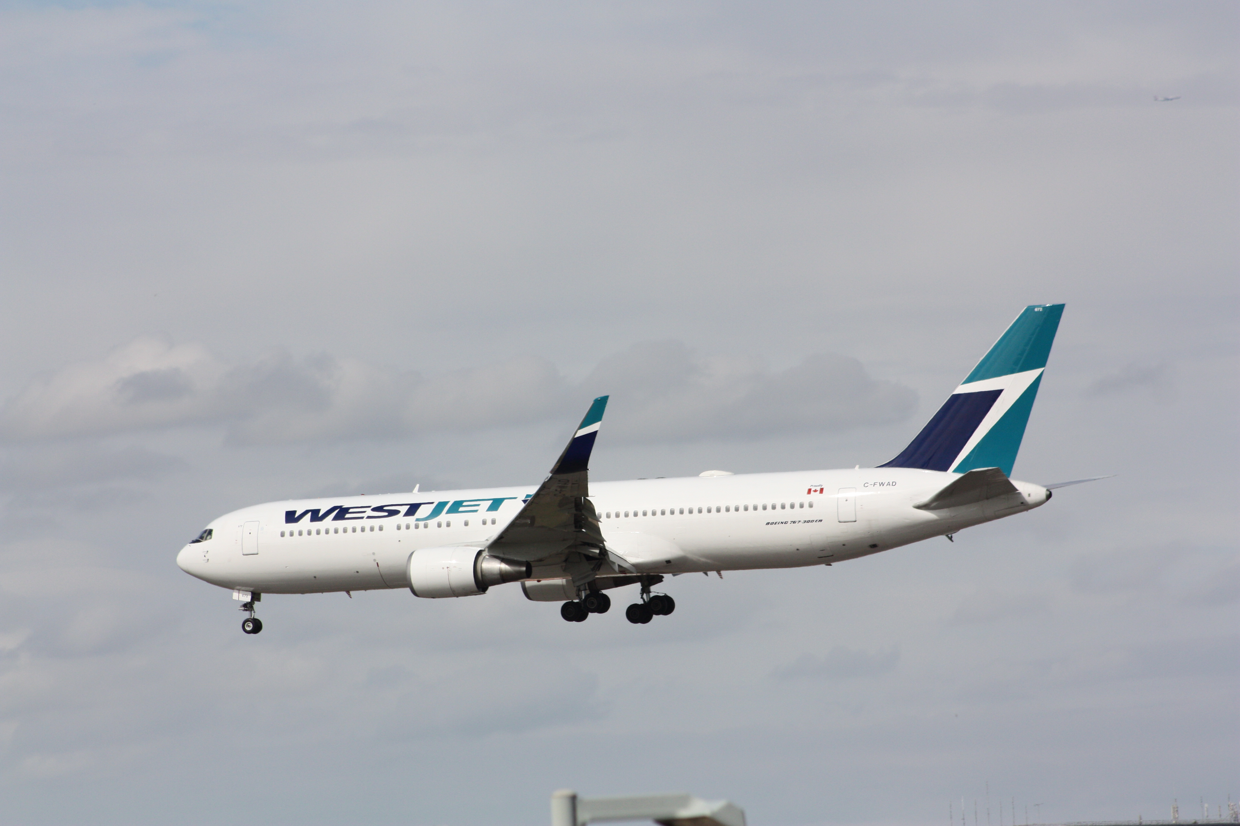 C-FWAD Gatwick 12/09/2016